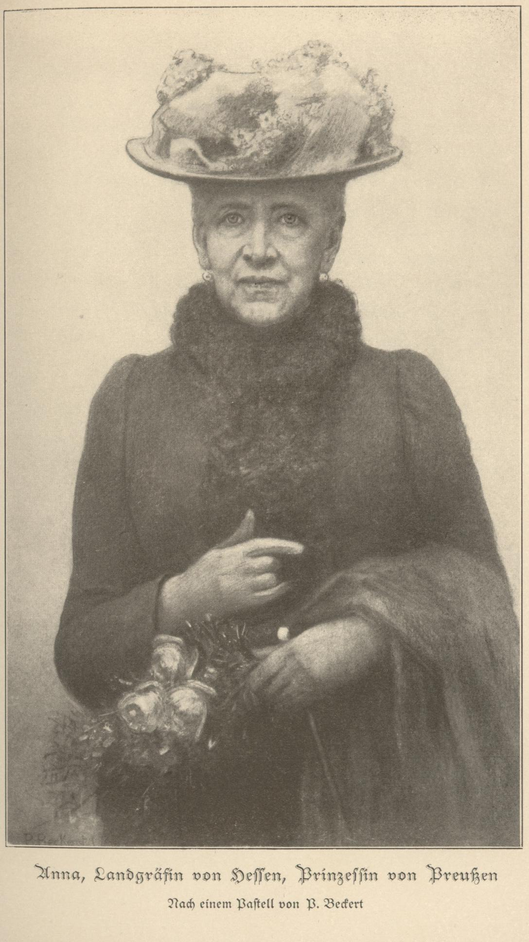 Prinzessin Anna von Preussen, Pastellbild von Paul Beckert (1856-1922)